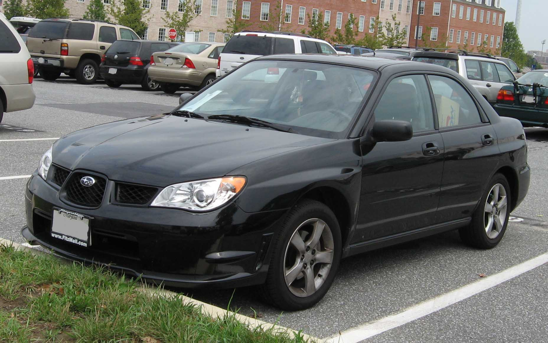 2006-2007 Subaru Impreza photographed in USA.